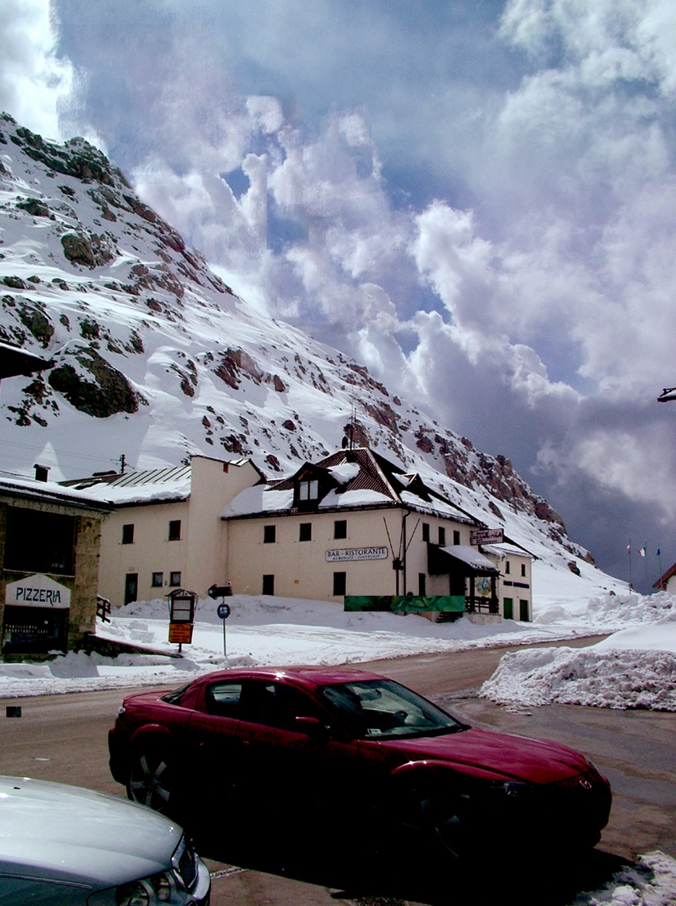 Olaszország, Pordoi-hágó